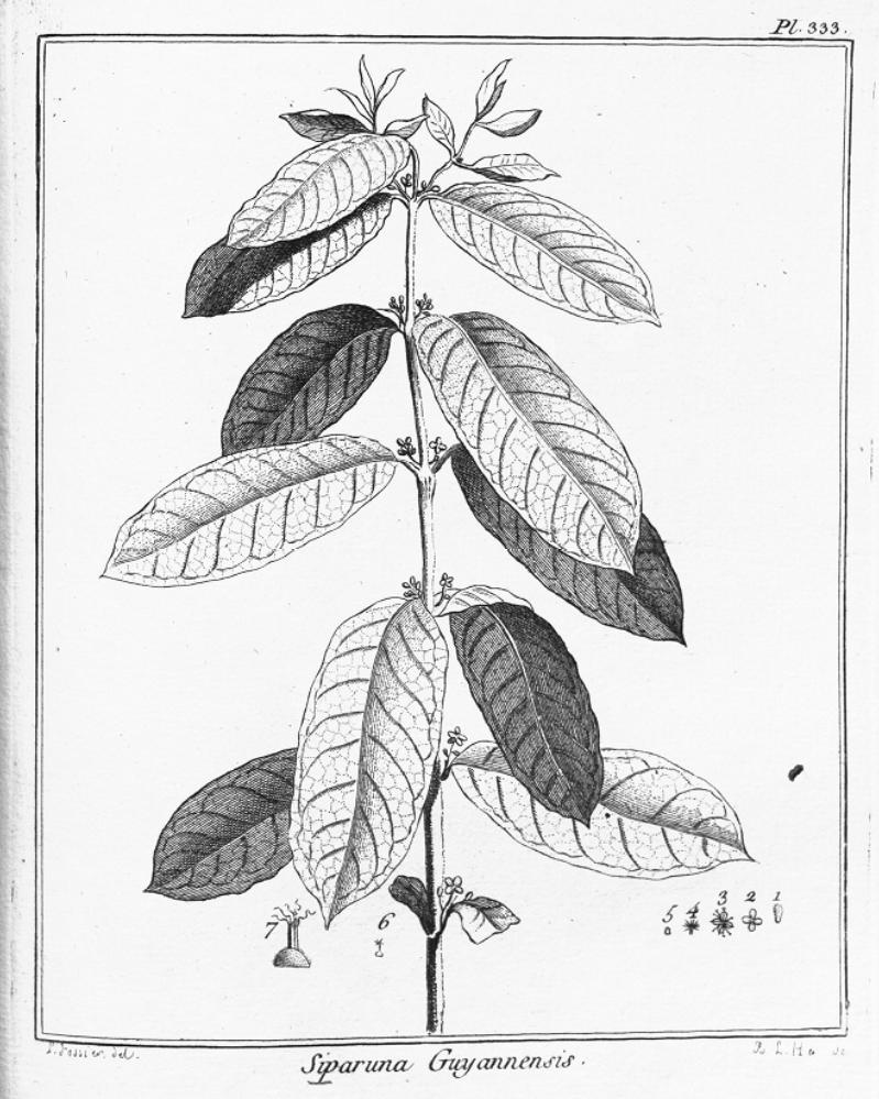 Illustration of Siparuna guianensis (Orig.: Siparuna guyannensis)